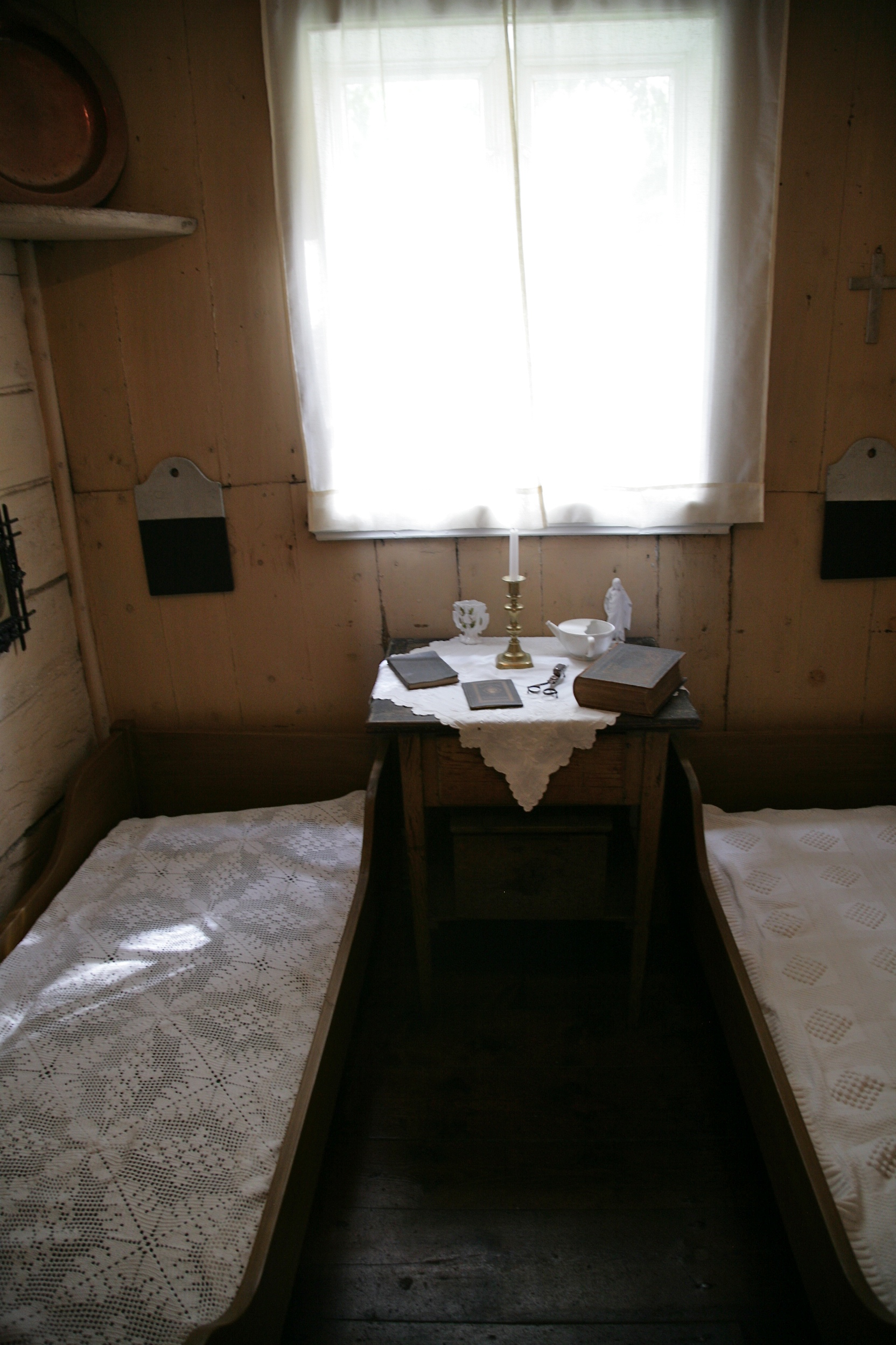 Lepramuseet i Bergen.